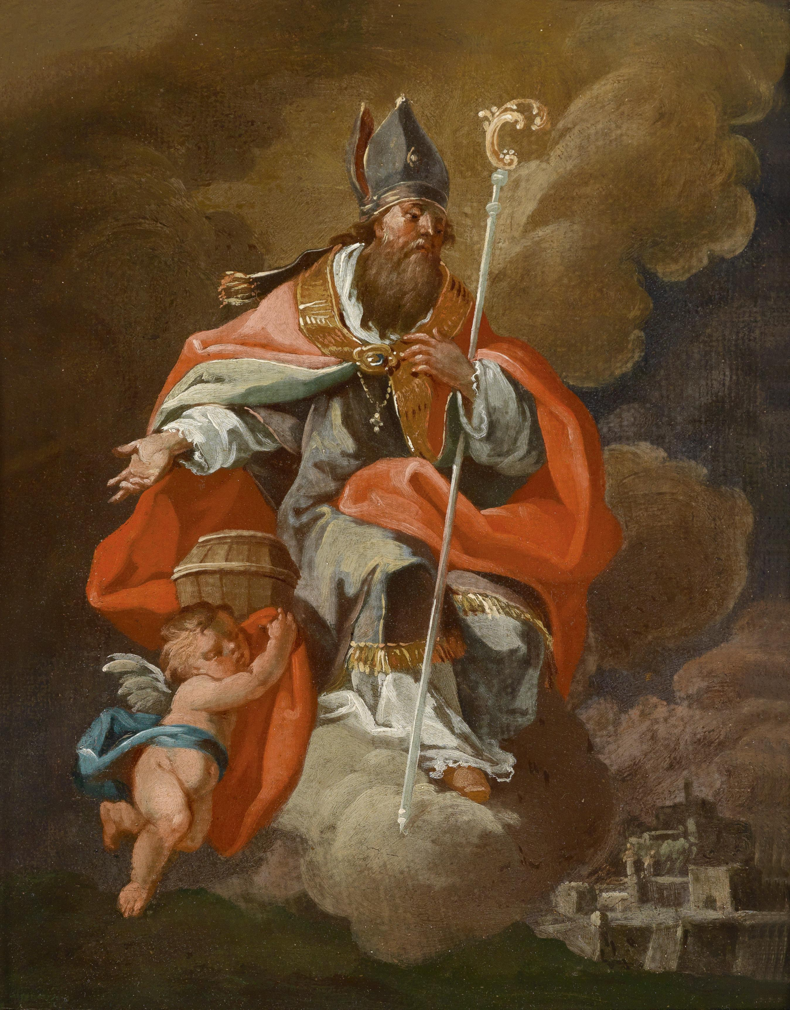 Der heilige Rupertus und ein Engel mit dem Salzkübel, seinem Attribut, über Salzburg schwebend